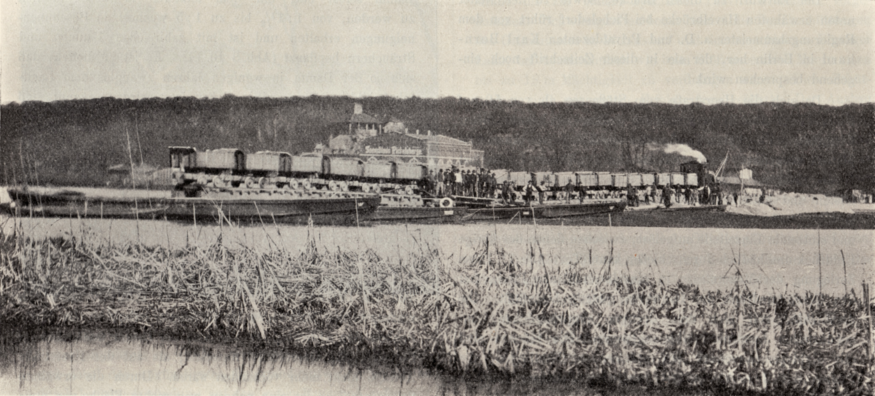 Berlin - Stössenseebrücke, Beginn der Dammaufschüttung